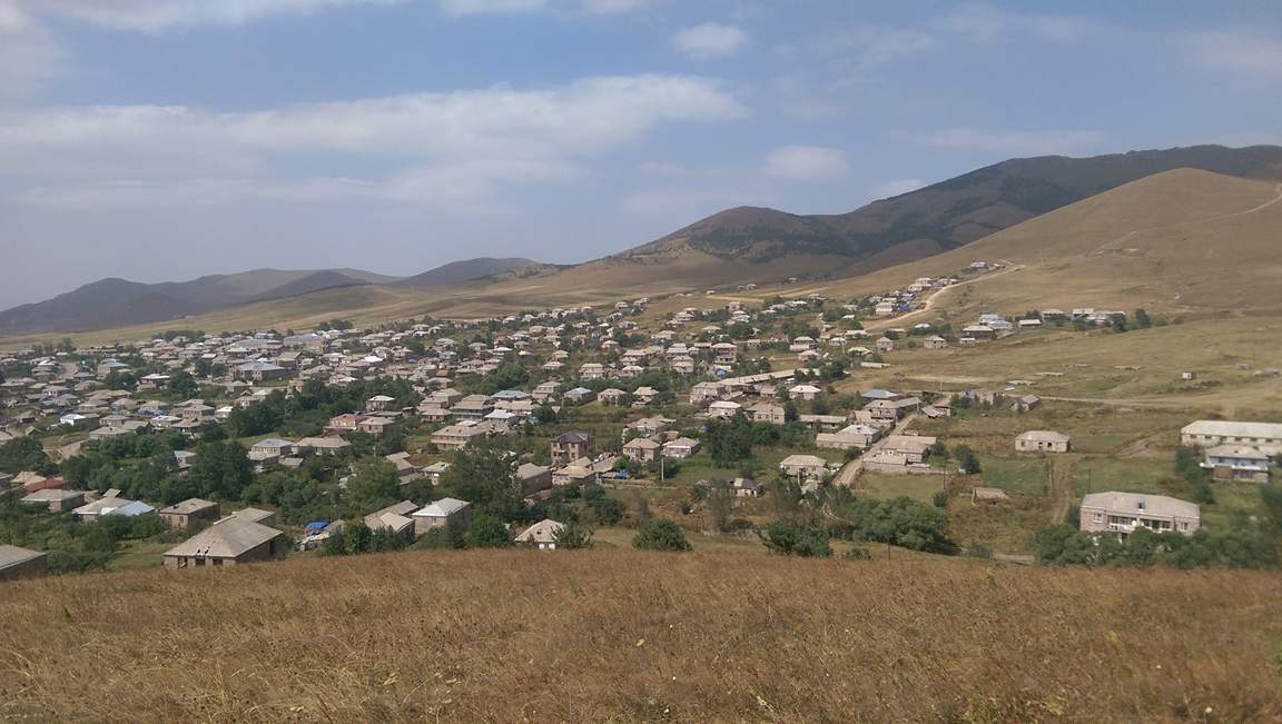 Սարչապետի համայնապատկերը